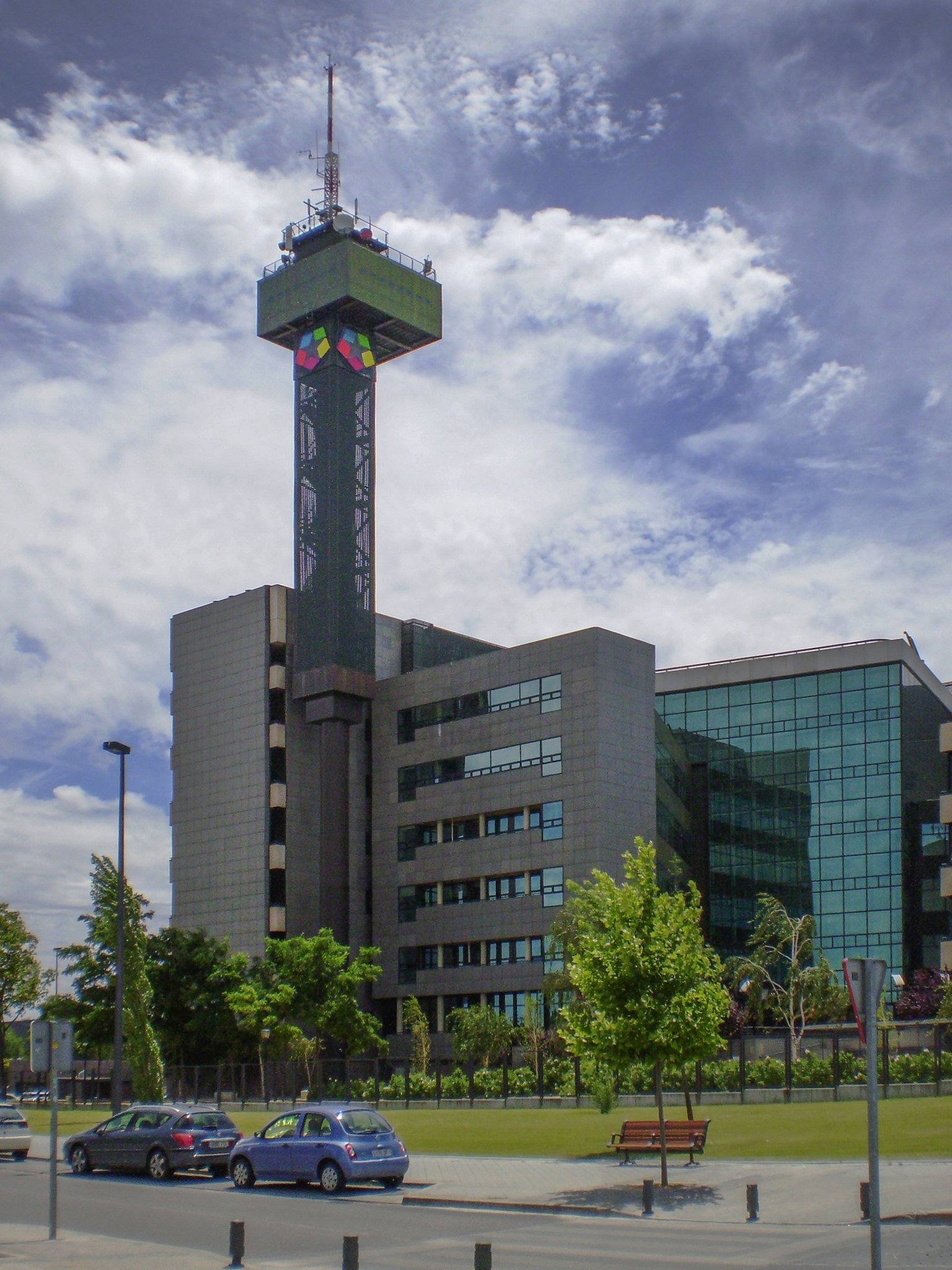 Telemadrid. Ciudad de la Imagen, Madrid, Spain